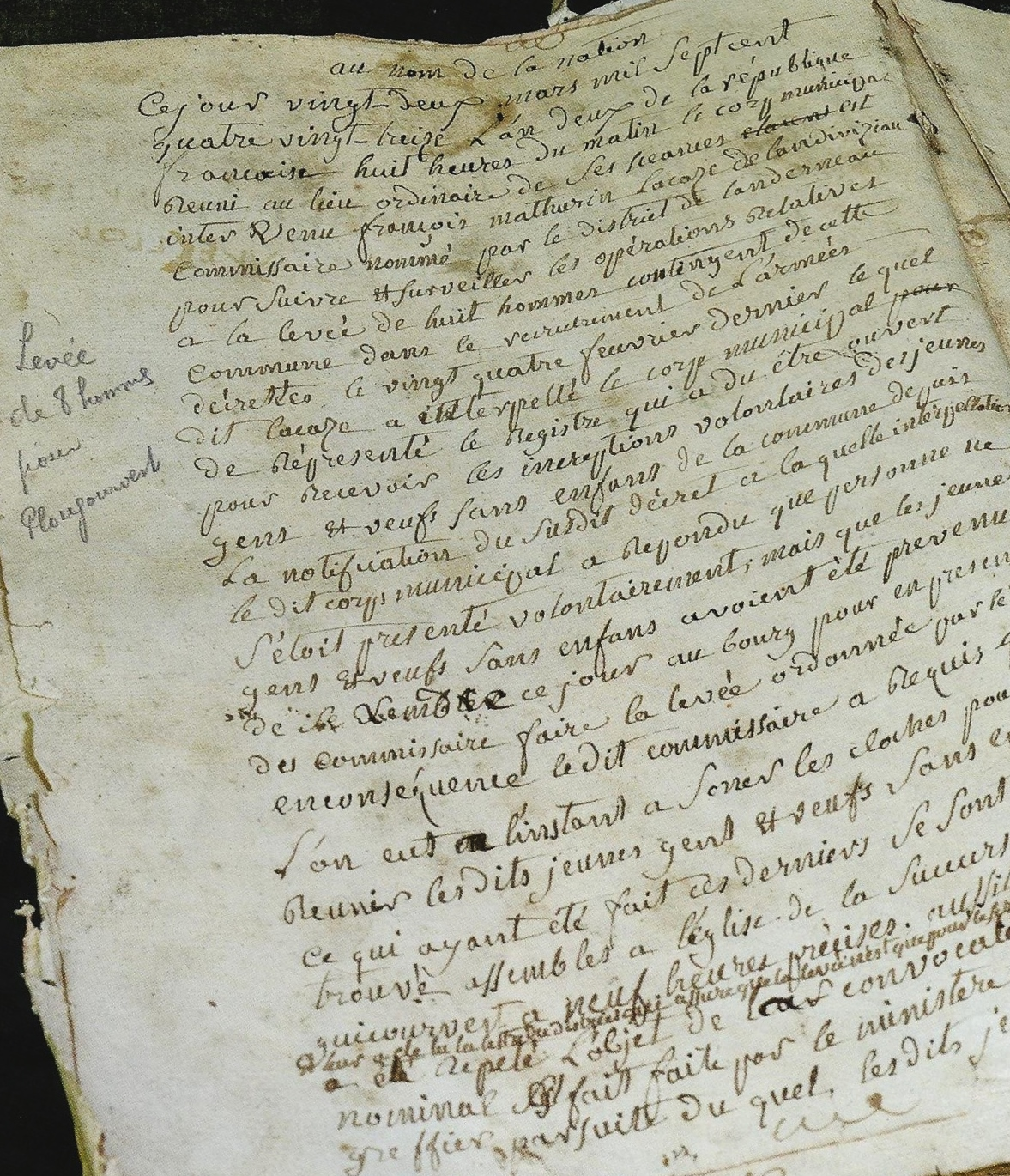 Plougourvest : registre des délibérations du corps municipal, page relatant les décisions prises le 22 mars 1793 à propos de la levée en masse